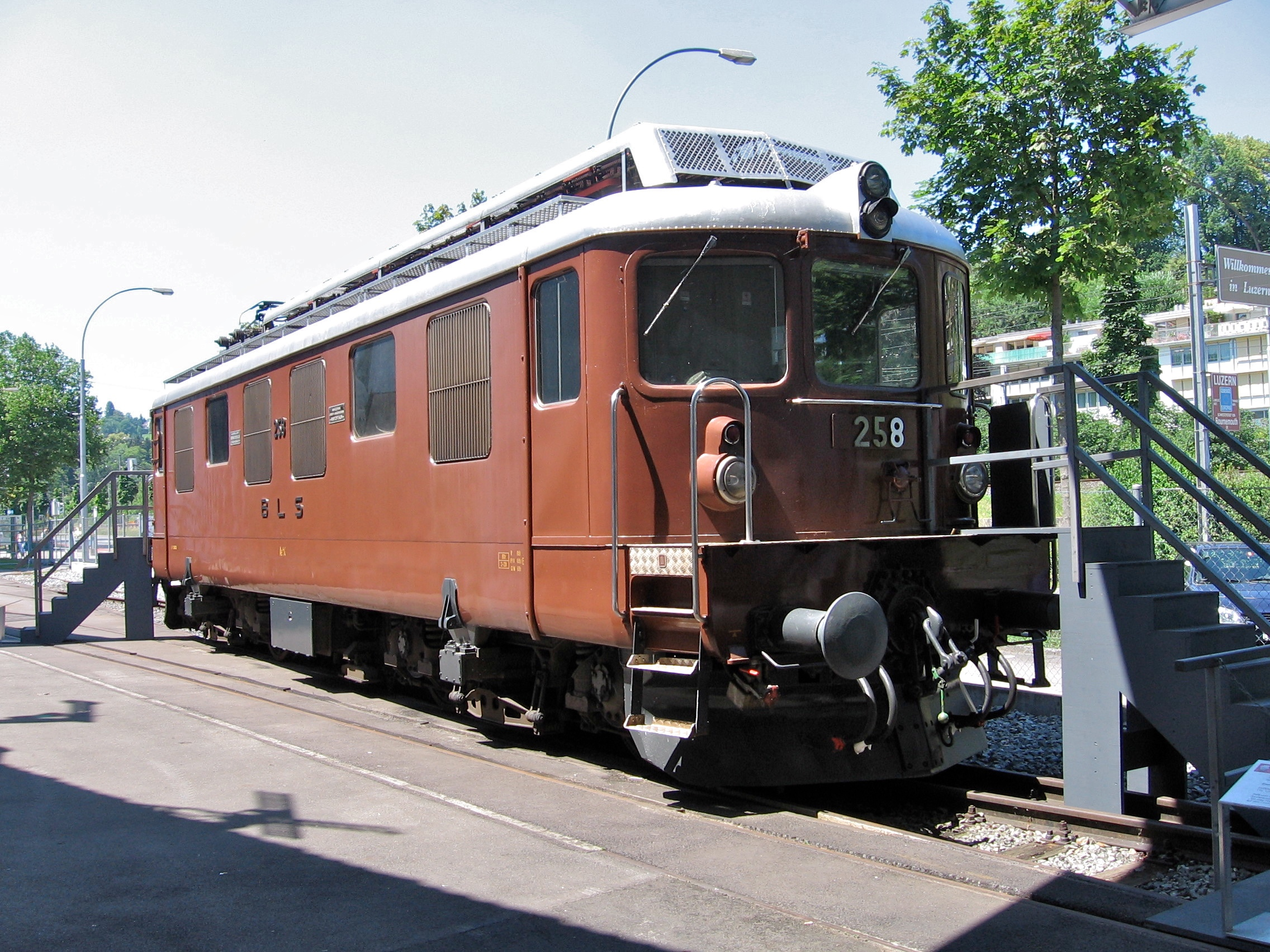 Lok der schweizerischen BLS